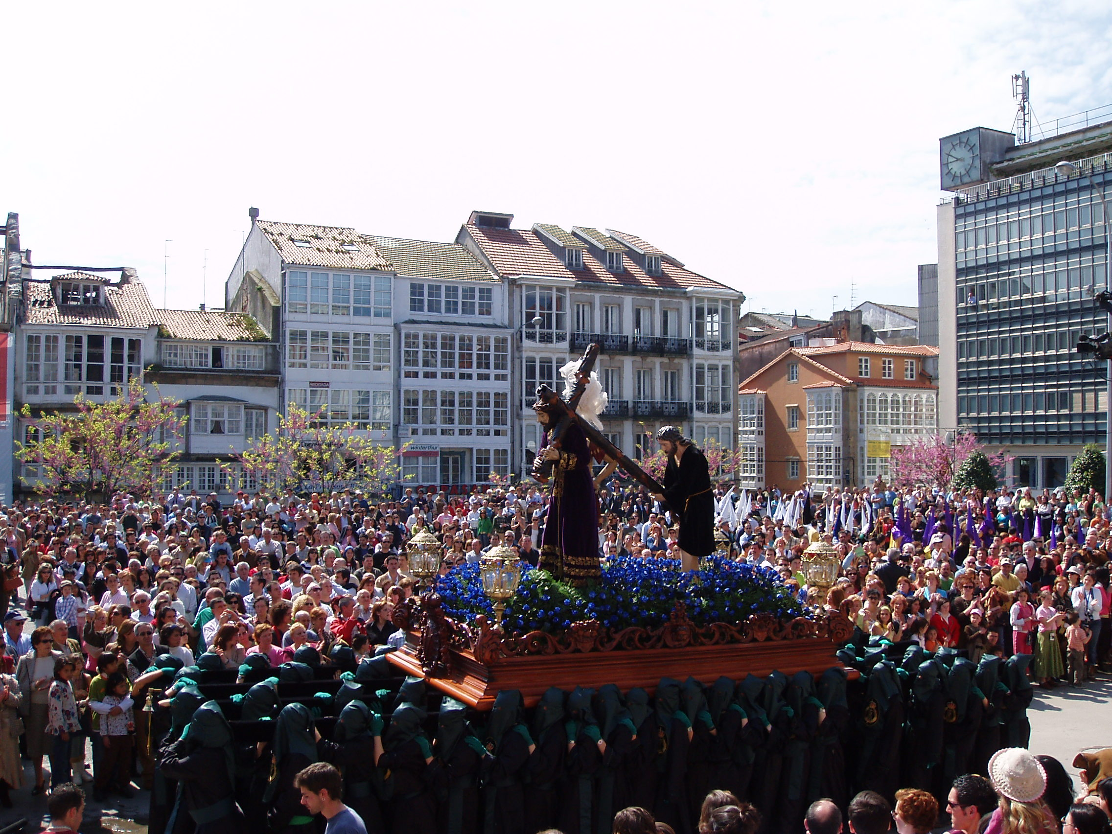 El paso de Jesús Nazareno en la Procesión del Santo Encuentro de 2.006.